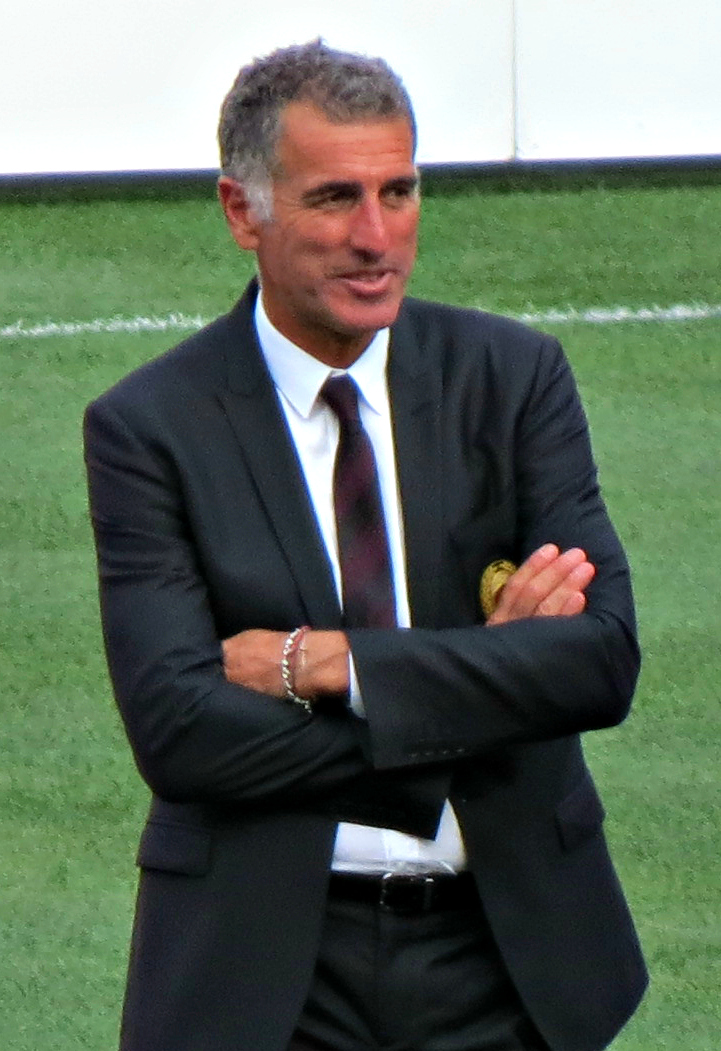 Mauro Tassotti (center), assistant manager for AC Milan.